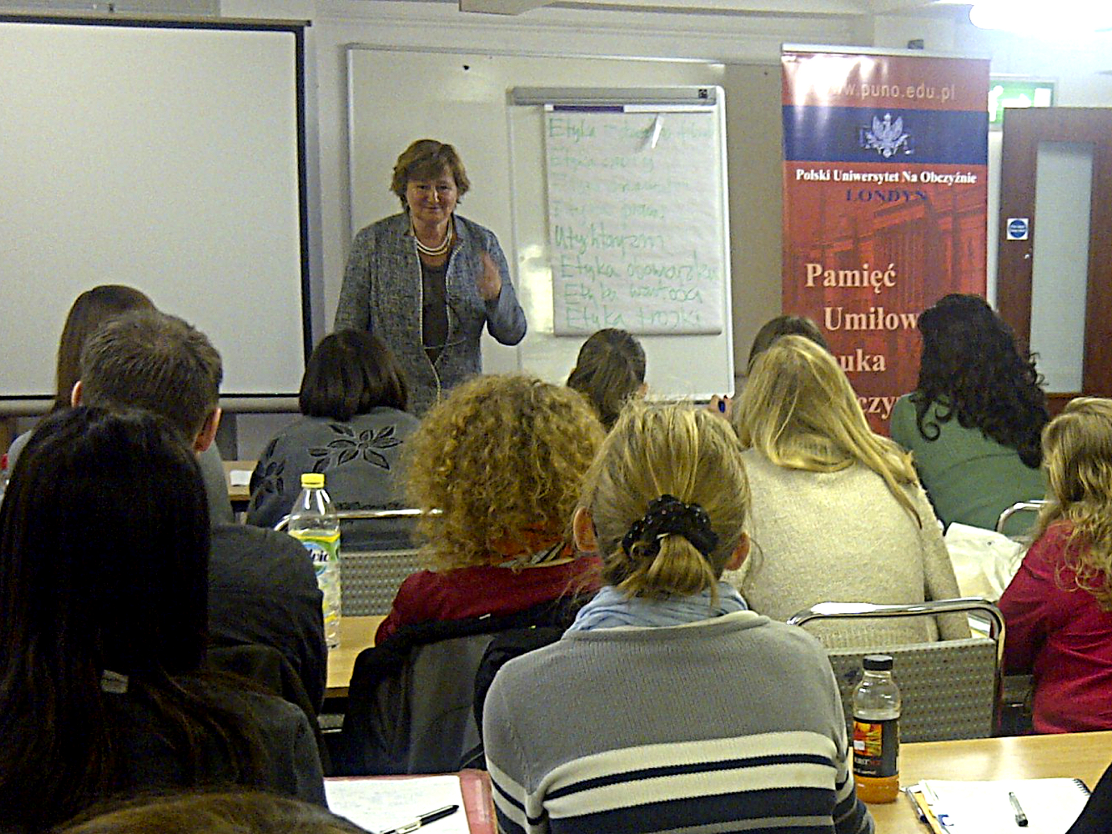 Prof. Magdalena Środa - w trakcie wykładu dla studentów Polskiego Uniwersytetu Na Obczyźnie w Londynie.